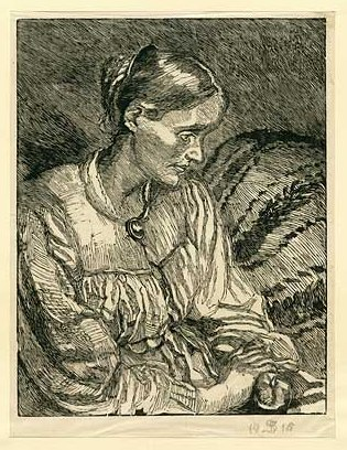 Anna Syberg, Danish painter